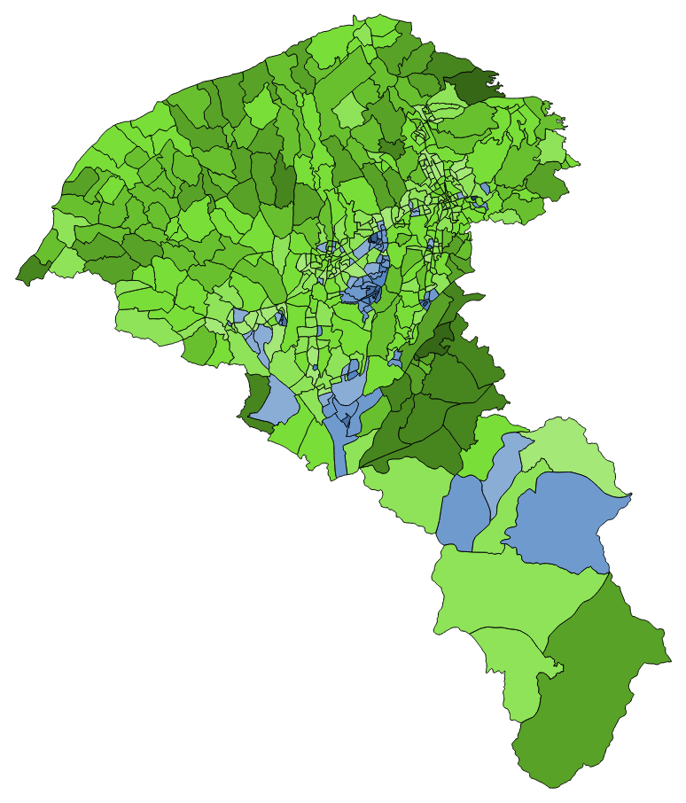 顏色對照表